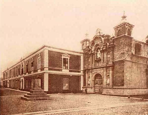 Casona de la Universidad de San Marcos, inicios del siglo XX.